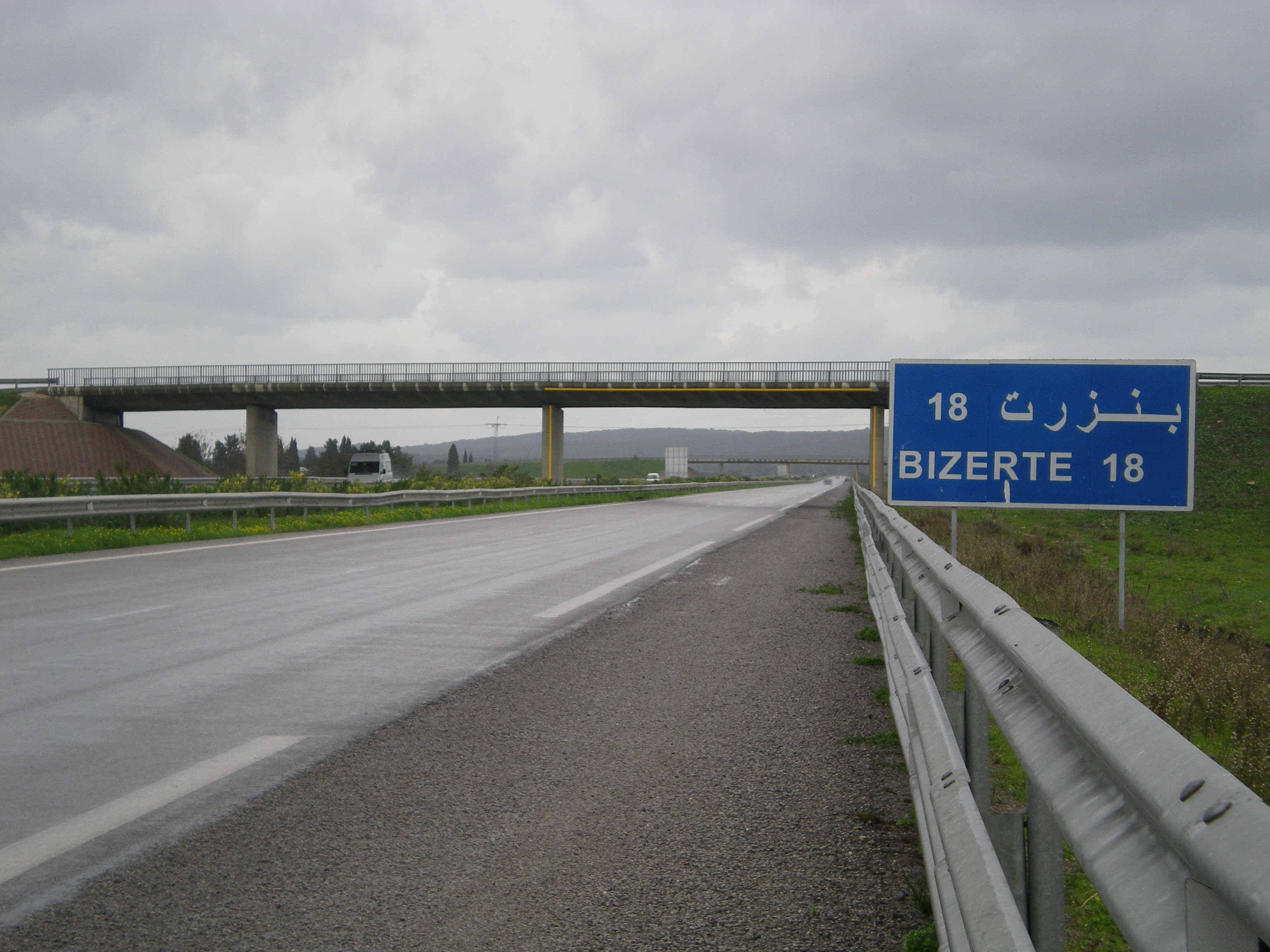 Ponts de l'échangeur El Alia (direction Bizerte), Autoroute A4, Tunisie